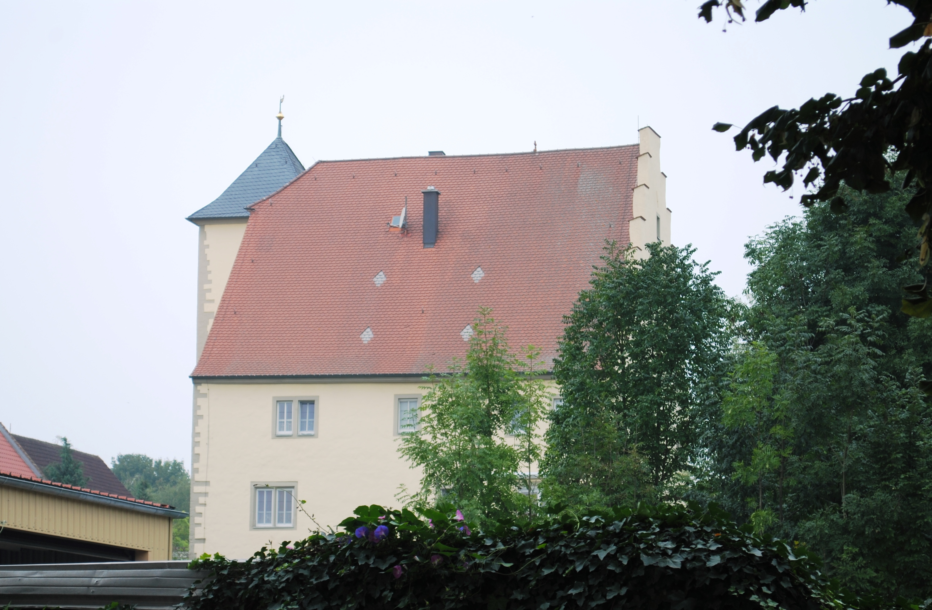 Gutshof, ehemaliges Weiherhaus, Bibergau